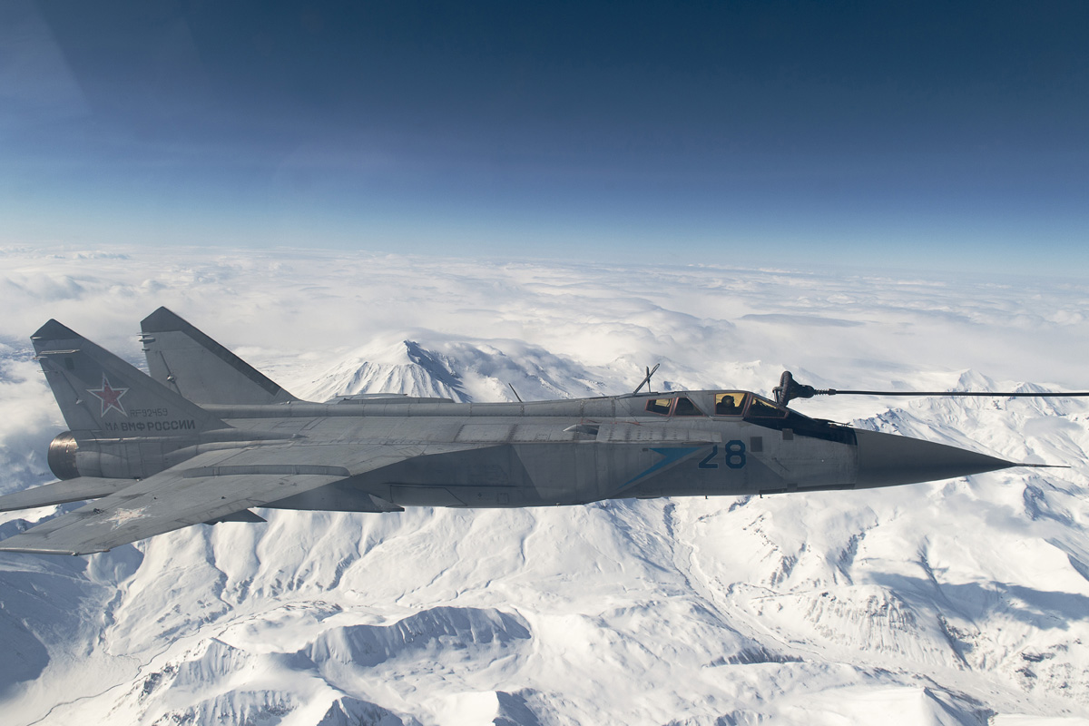 На Камчатке истребители МиГ-31 ТОФ отработали перехват крылатой ракеты условного противника.